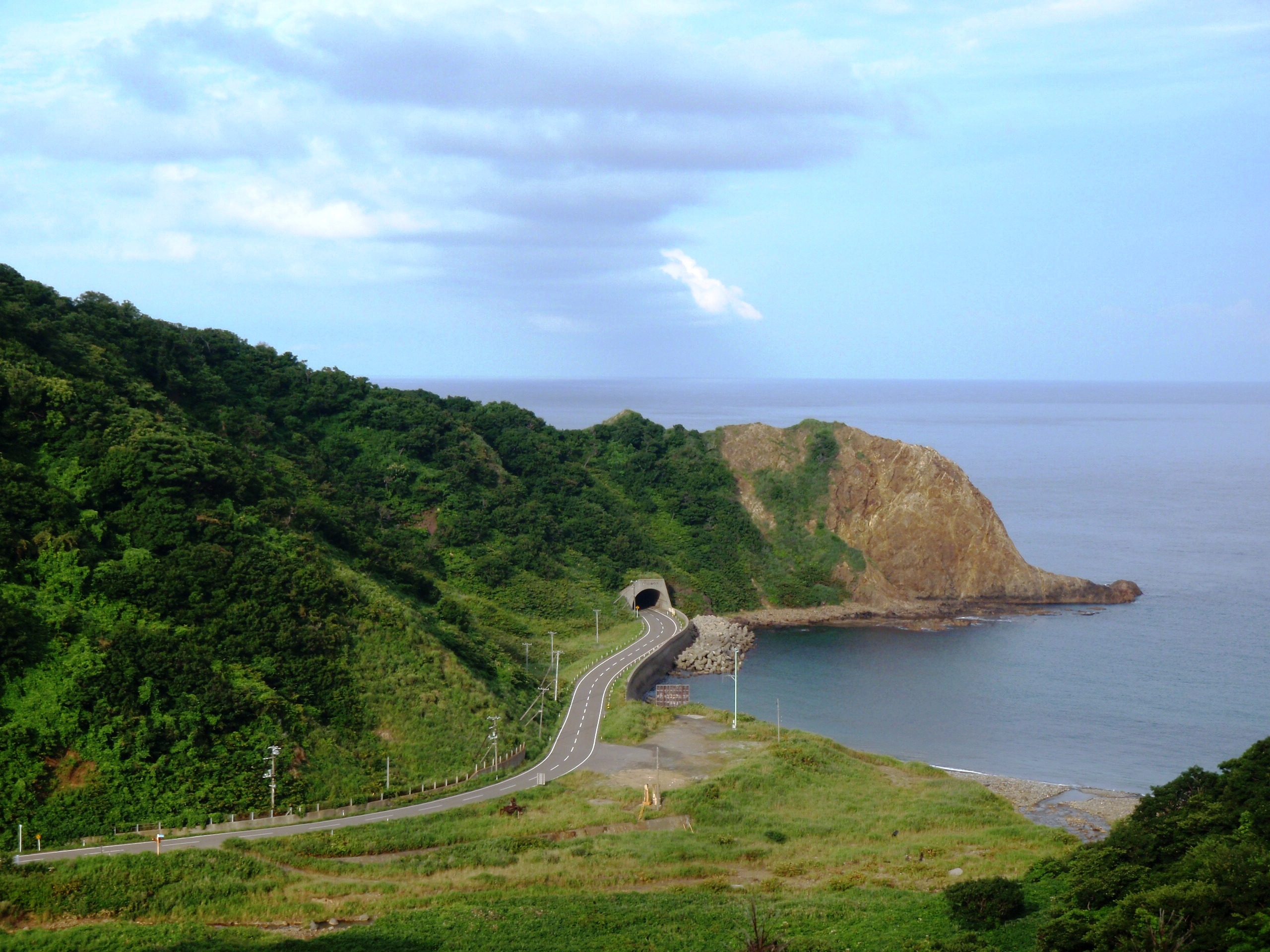 奥尻島、幌内地区,幌内トンネルと道道39号